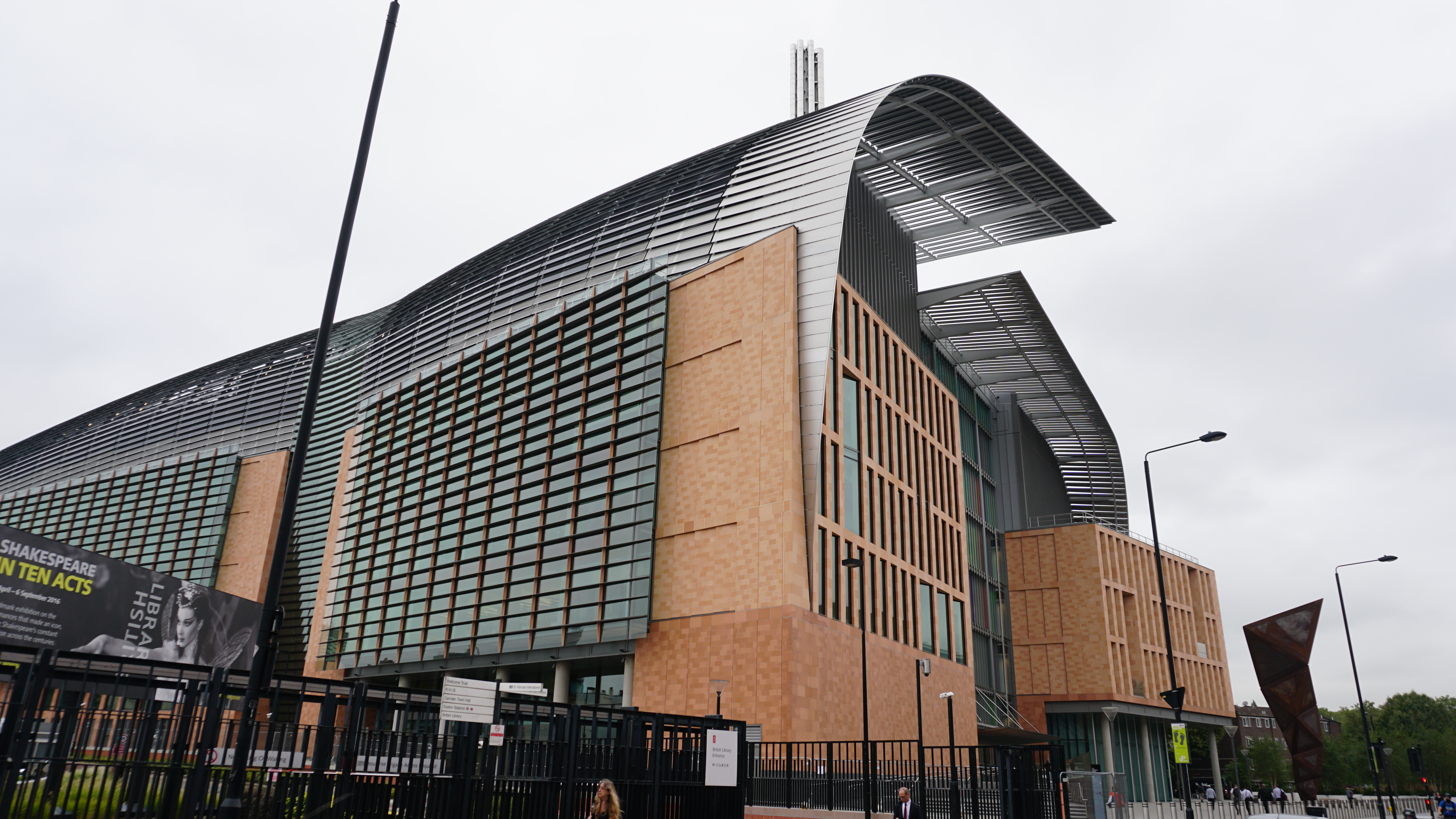 A little visit in London Une petite visite a Londres